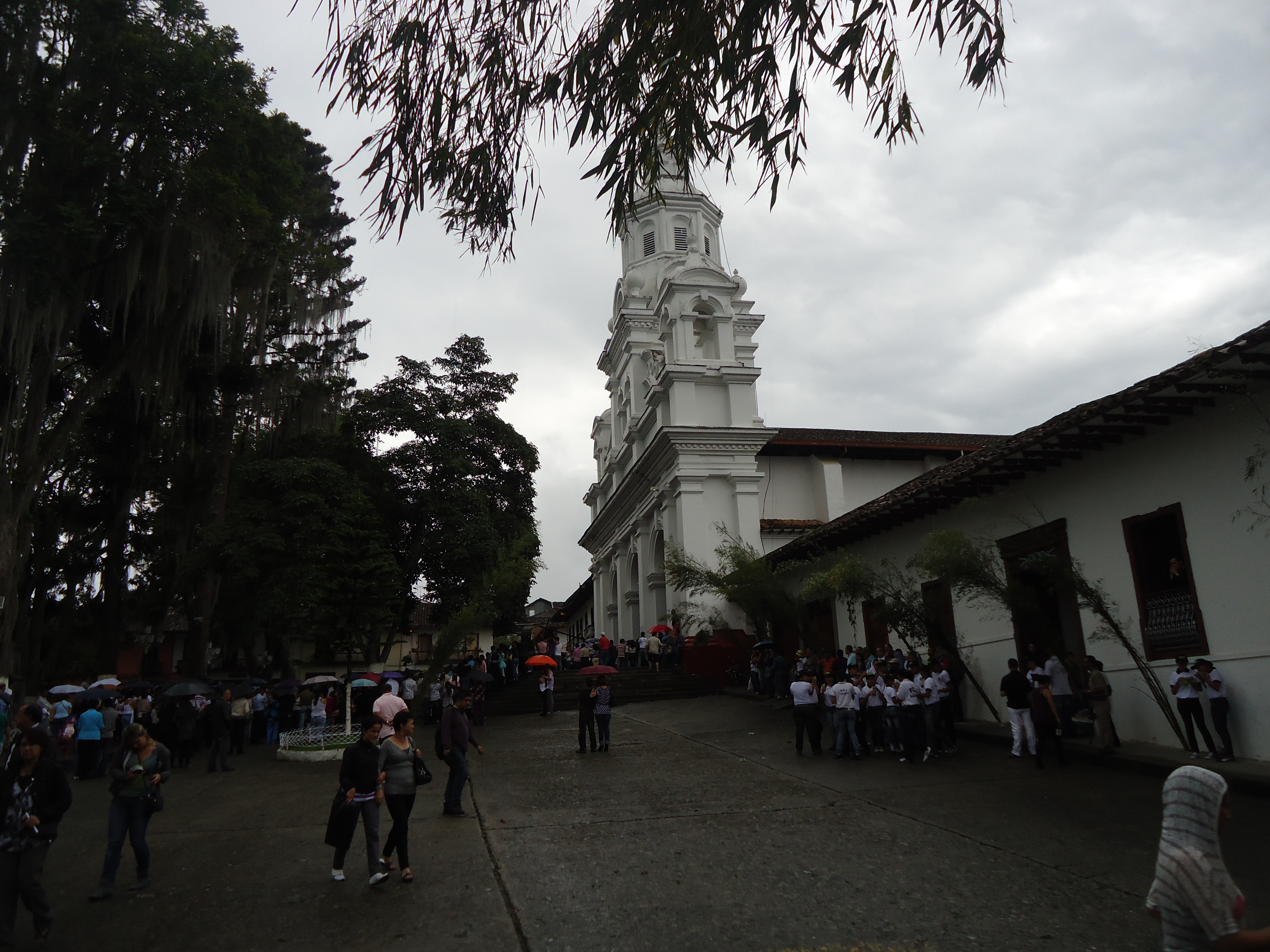 parque principal del muncipio salamina caldas